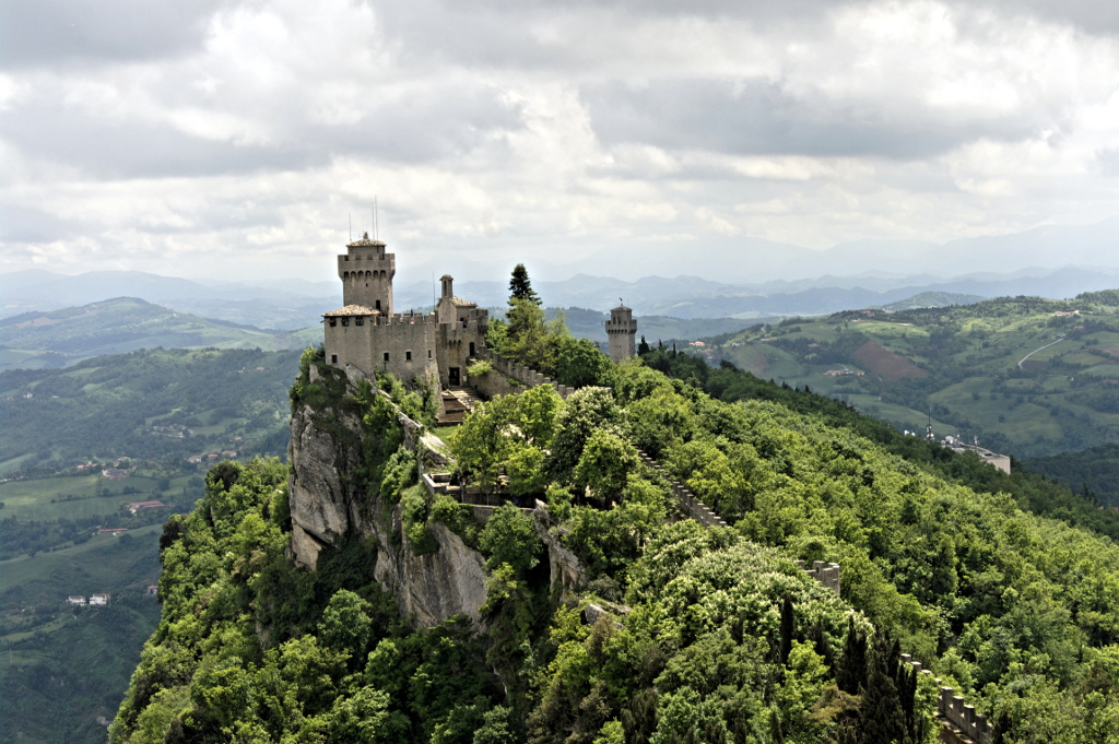 Panoramica della torre La Cesta o Fratta a San Marino